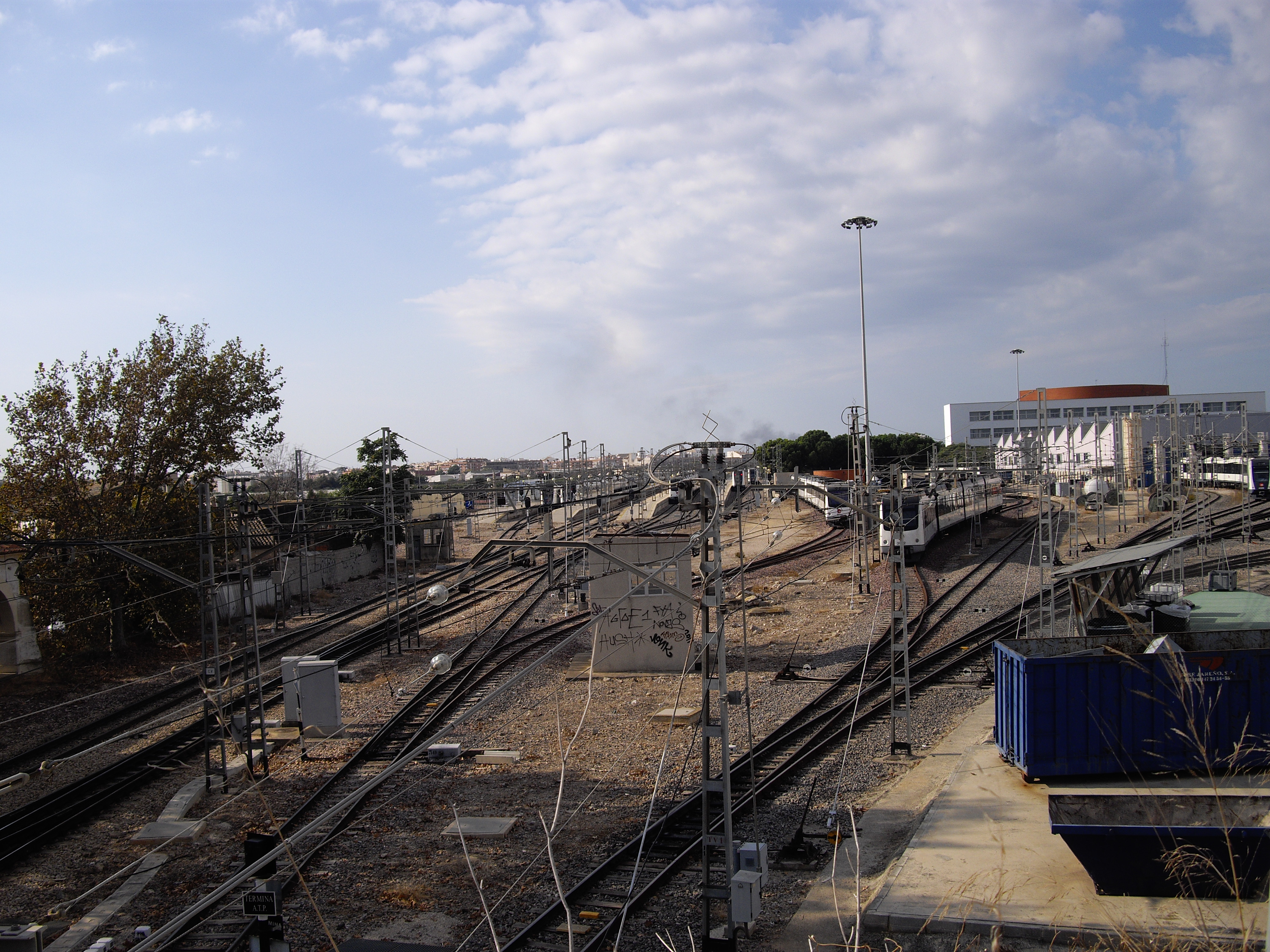 Vies de València-Sud.